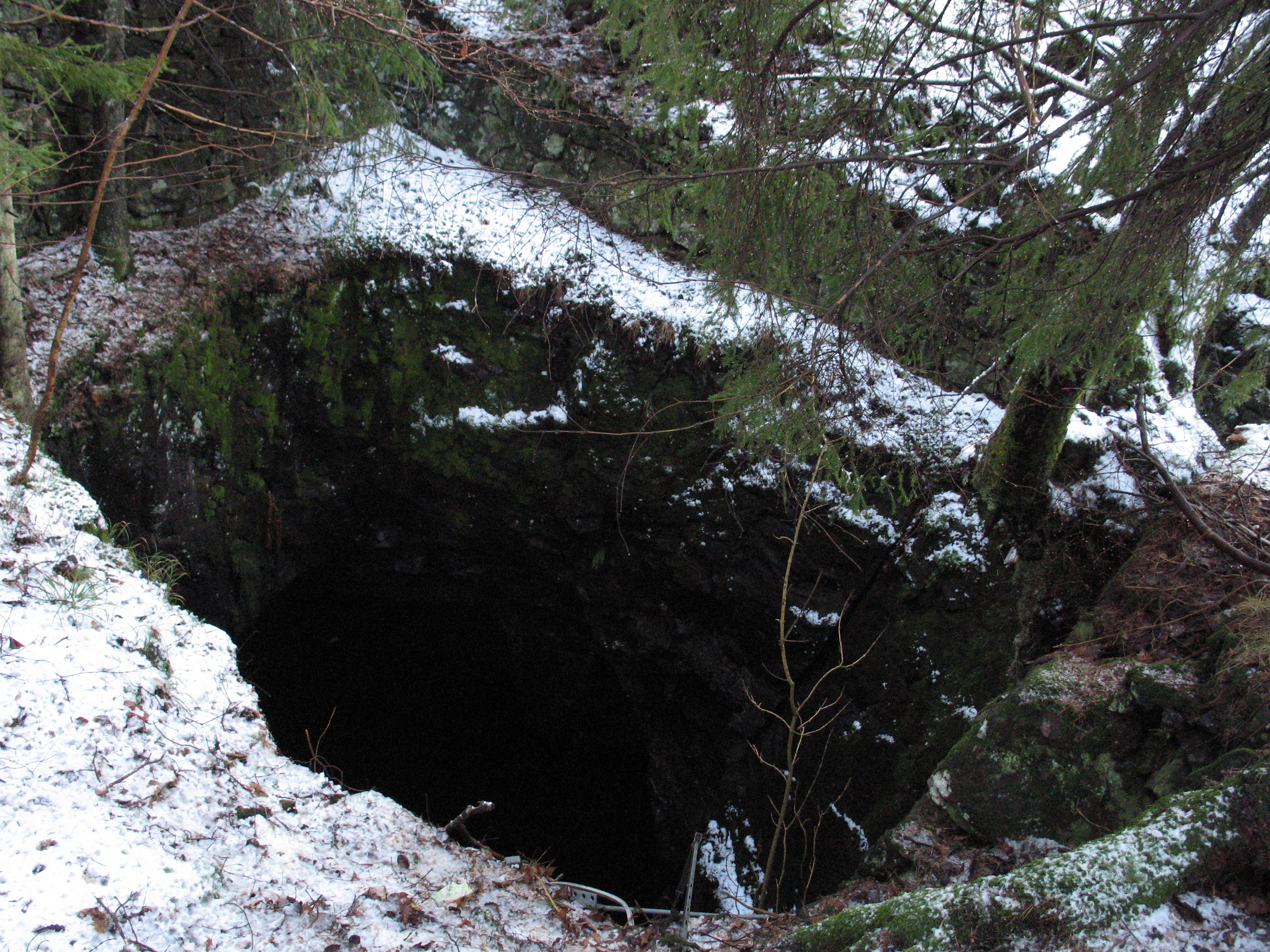 Jerngruvene i Arendalsfeltet fremstår oftest som et hull ned i grunnen, fyllt med vann. Murer av naturstein omkranset åpningene, helt eller delvis. De fleste jerngruvene i Arendalsfeltet er i dag godt skjult bak trær og kratt.